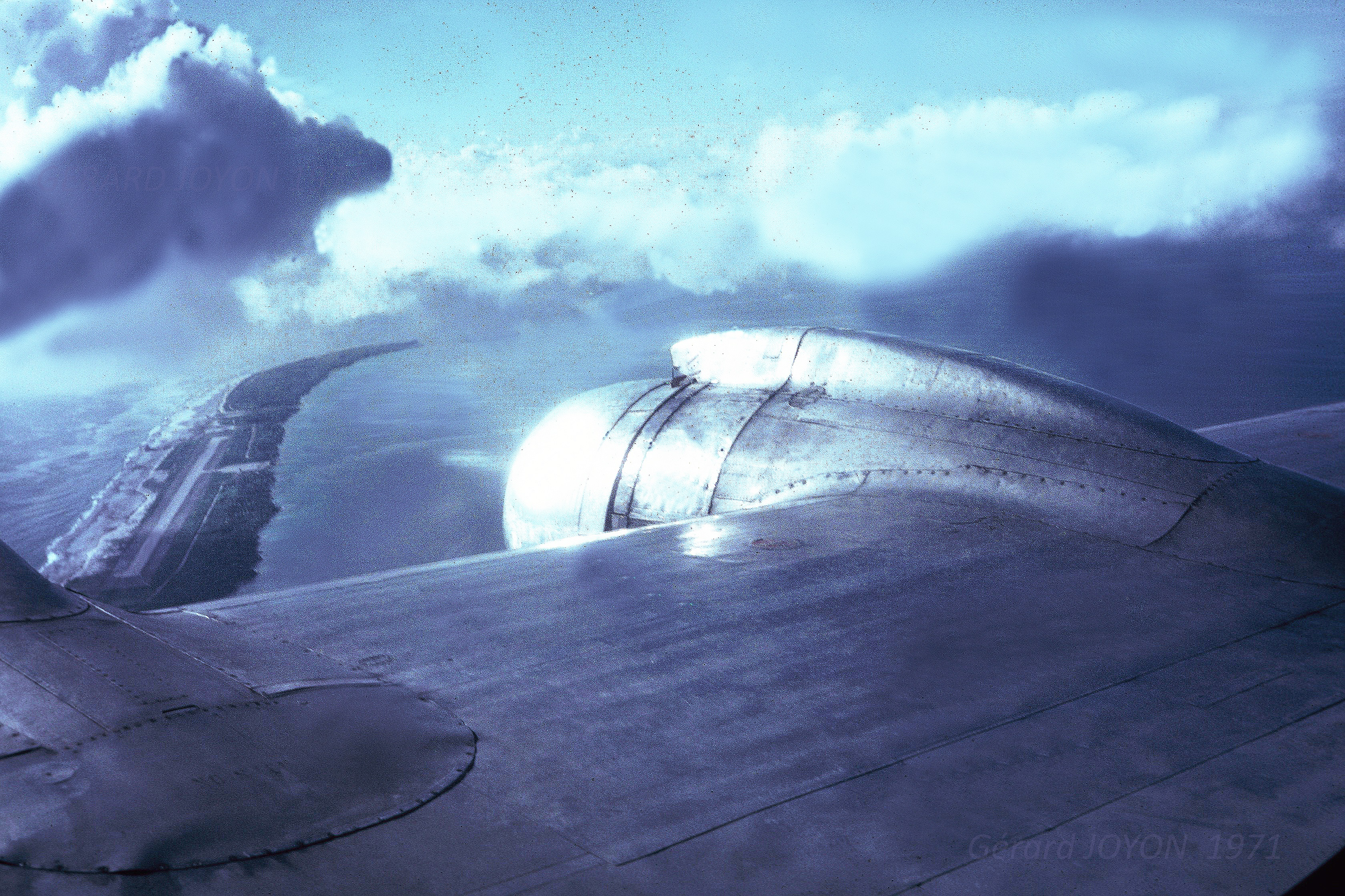 MISSION SUR MORUROA DC6 ANCIENNE PISTE UTILISEE EN 1971 PENDANT LES ESSAIS NUCLEAIRES GERARD JOYON